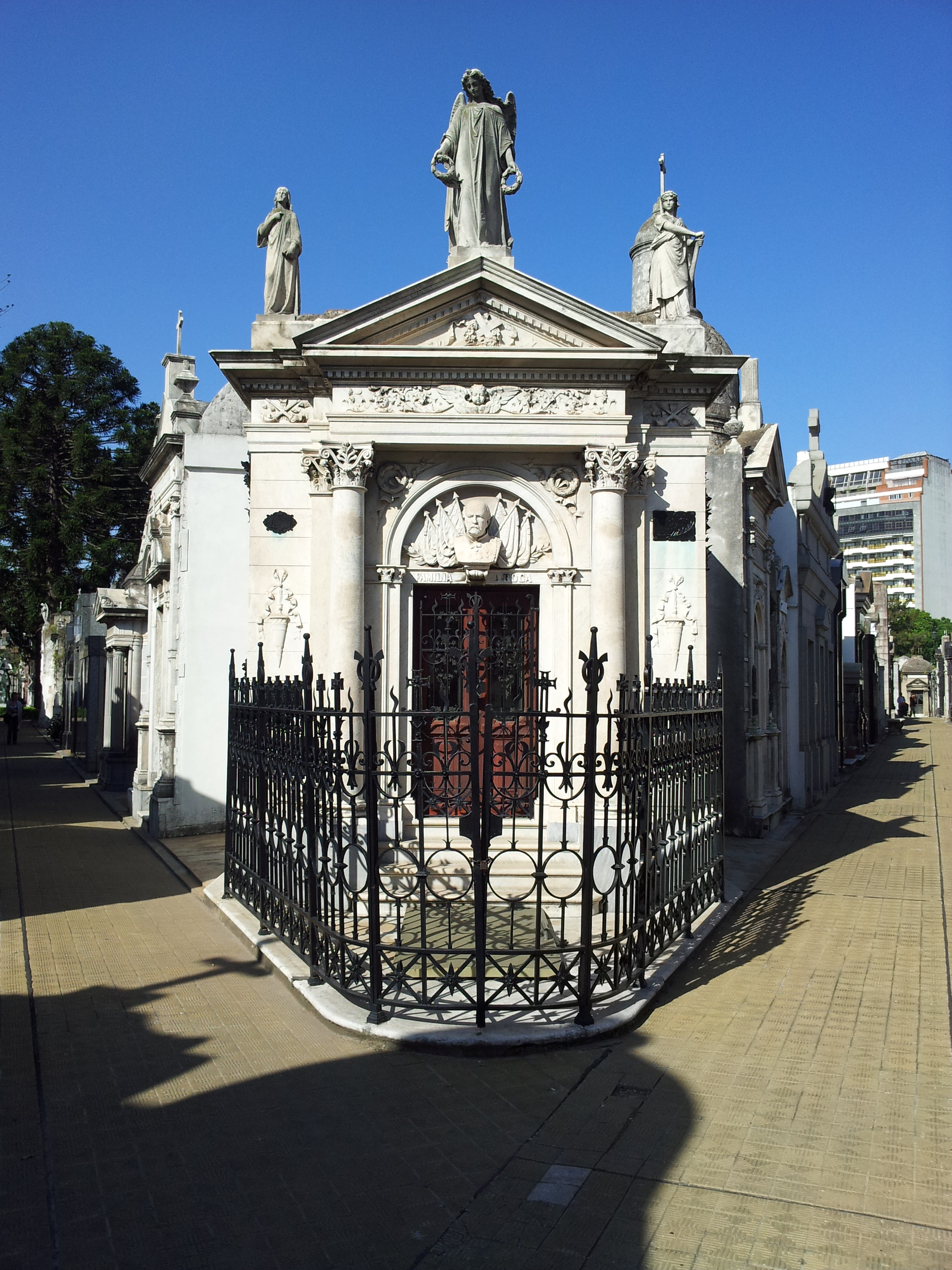 Sepulcro de Julio Argentino Roca